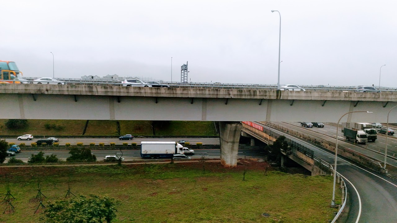 五楊高架林口段側拍